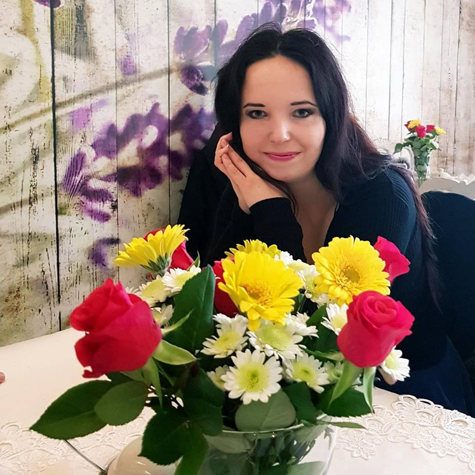 Karolina Kułakowska w 2018, fot. Łukasz Szymański